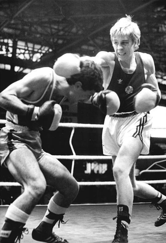 Mohamed Ali Dahan, Ronald Poye ADN-ZB Lehmann 12.3.83 Halle: XII. Internationales Boxturnier um den Chemiepokal - Vorzeitig kam der Berliner TSC-Boxer Ronald Poye (r.) zum Erfolg, der im Weltgewicht Mohamed Ali Dahan (Syrien) zweimal genau konterte und in der 1. Runde durch RSC gewann.